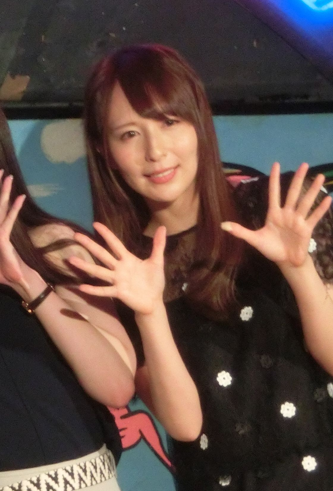 This file has been extracted from another file: KajifesCIMG3734.jpg